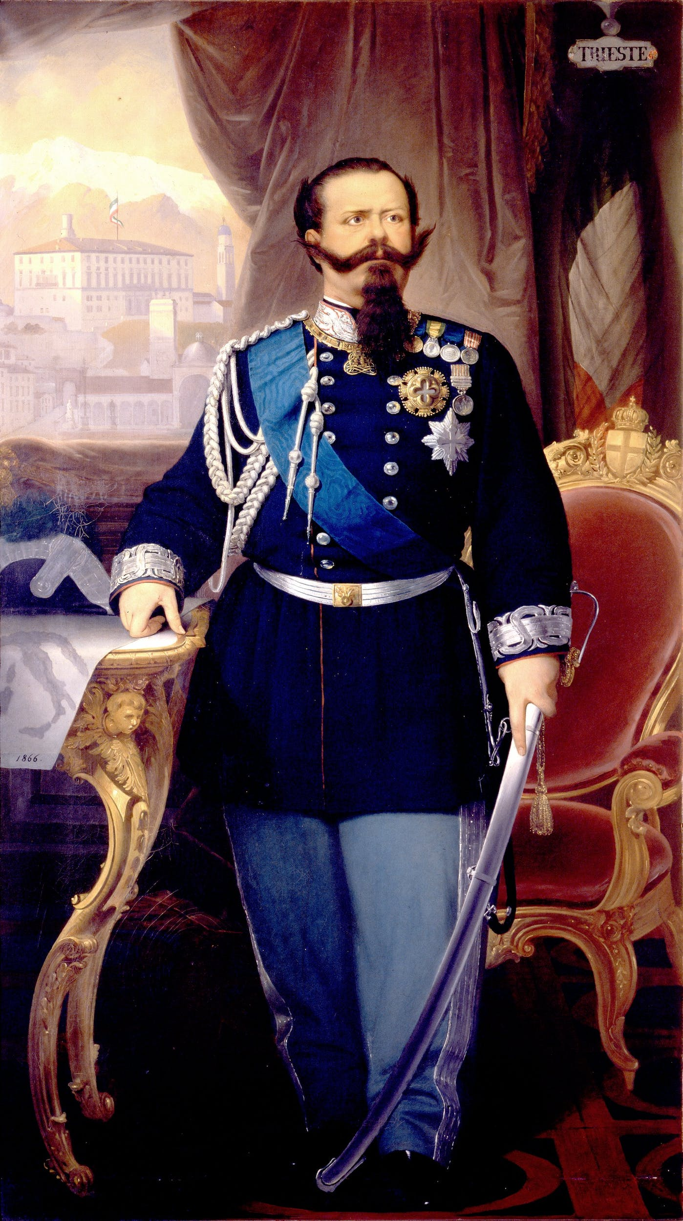 Ritratto di re Vittorio Emanuele II con sullo sfondo immagini della città di Udine 1866 Olio su tela, 142 x 80 cm Galleria d'Arte Moderna, Palazzo Pitti, Firenze